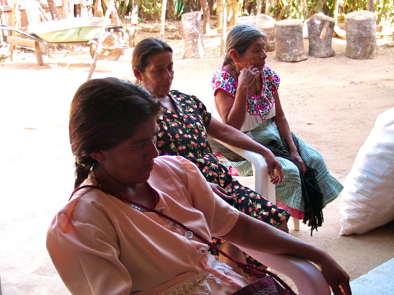 Women at a meeting in San Miguel Panixtlahuaca